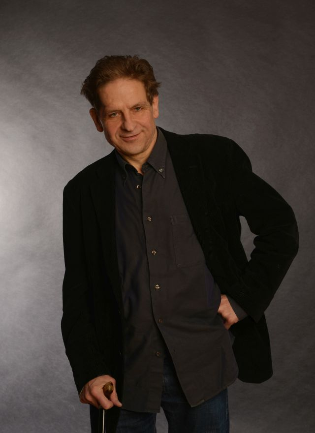 Portait-Foto 2